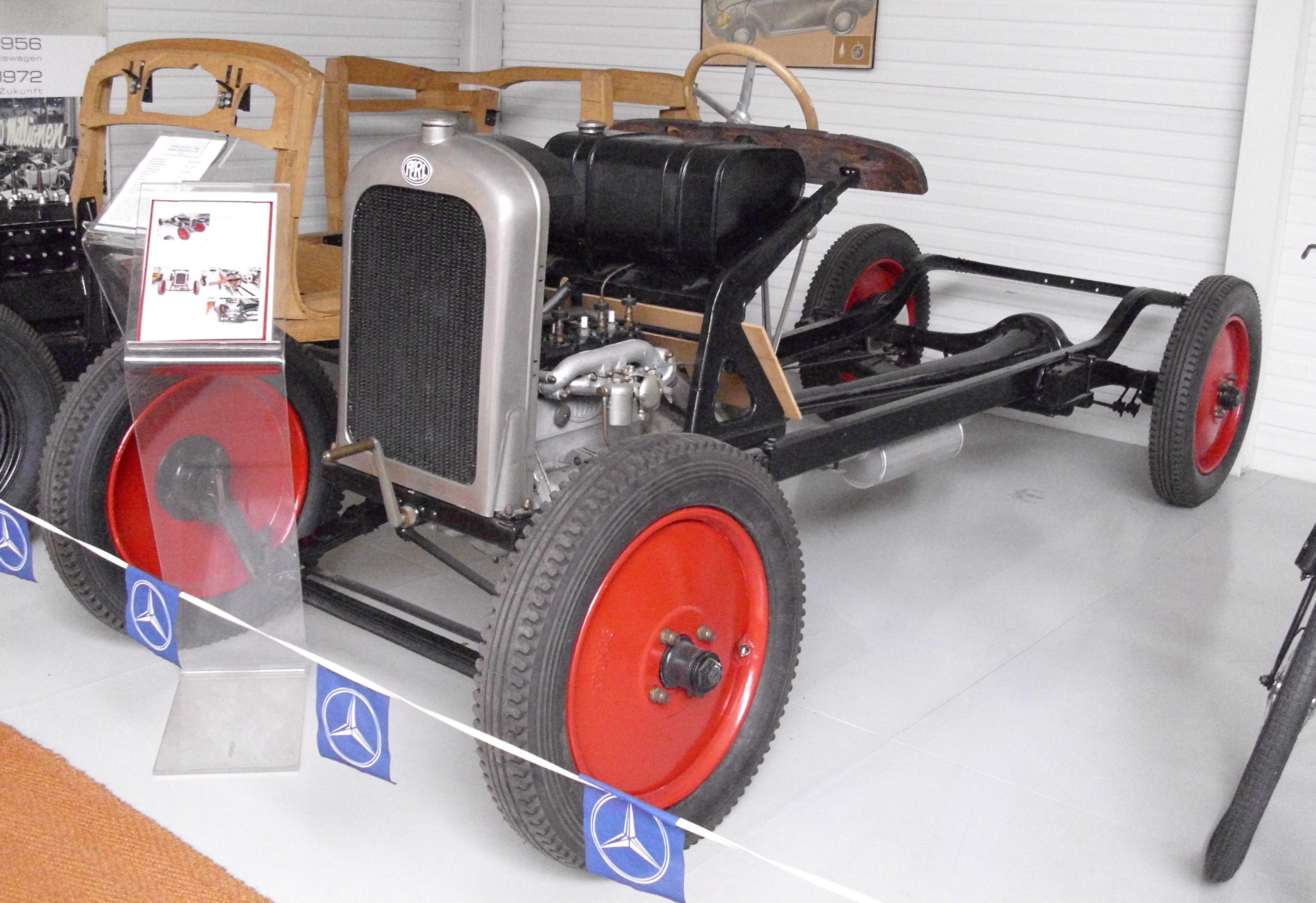 Perl 4/17 PS Suprema Fahrgestell von 1925 im Oldtimer-Museum Kröpfl